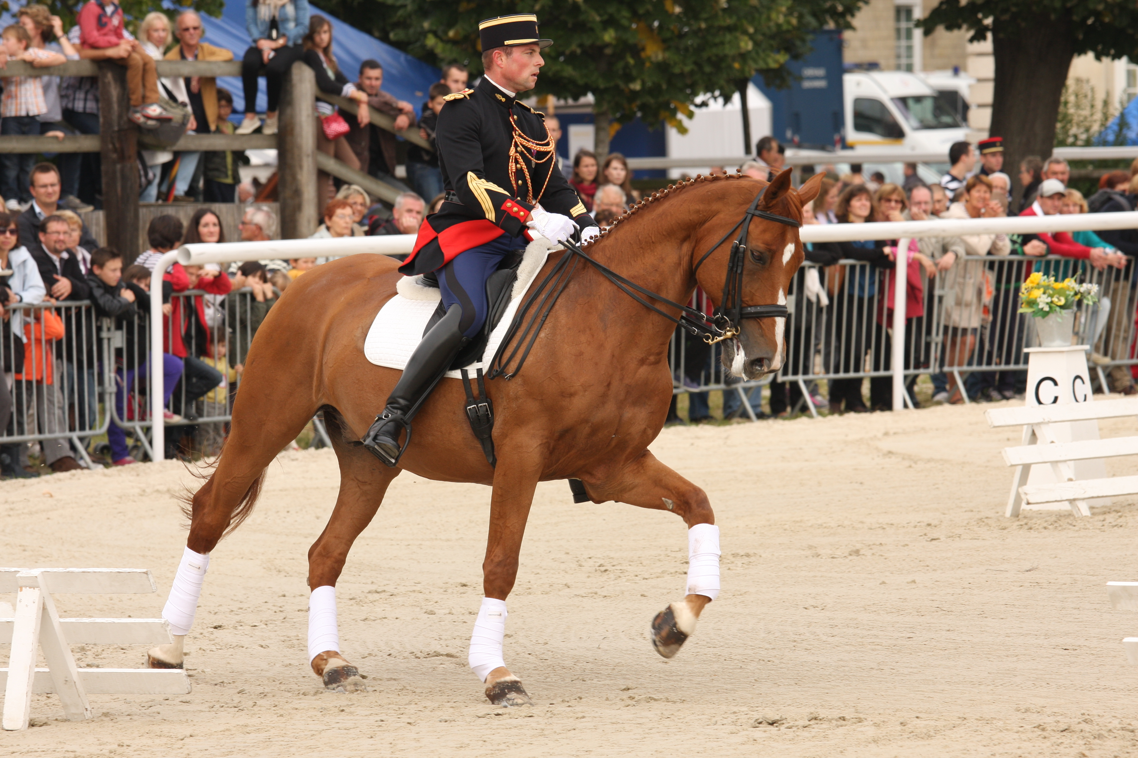 Solo de dressage - Quartier Carnot - Septembre 2013